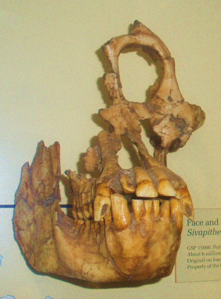 Fossil of Sivapithecus, an extinct mammal -- Took the photo at Natural History Museum, London